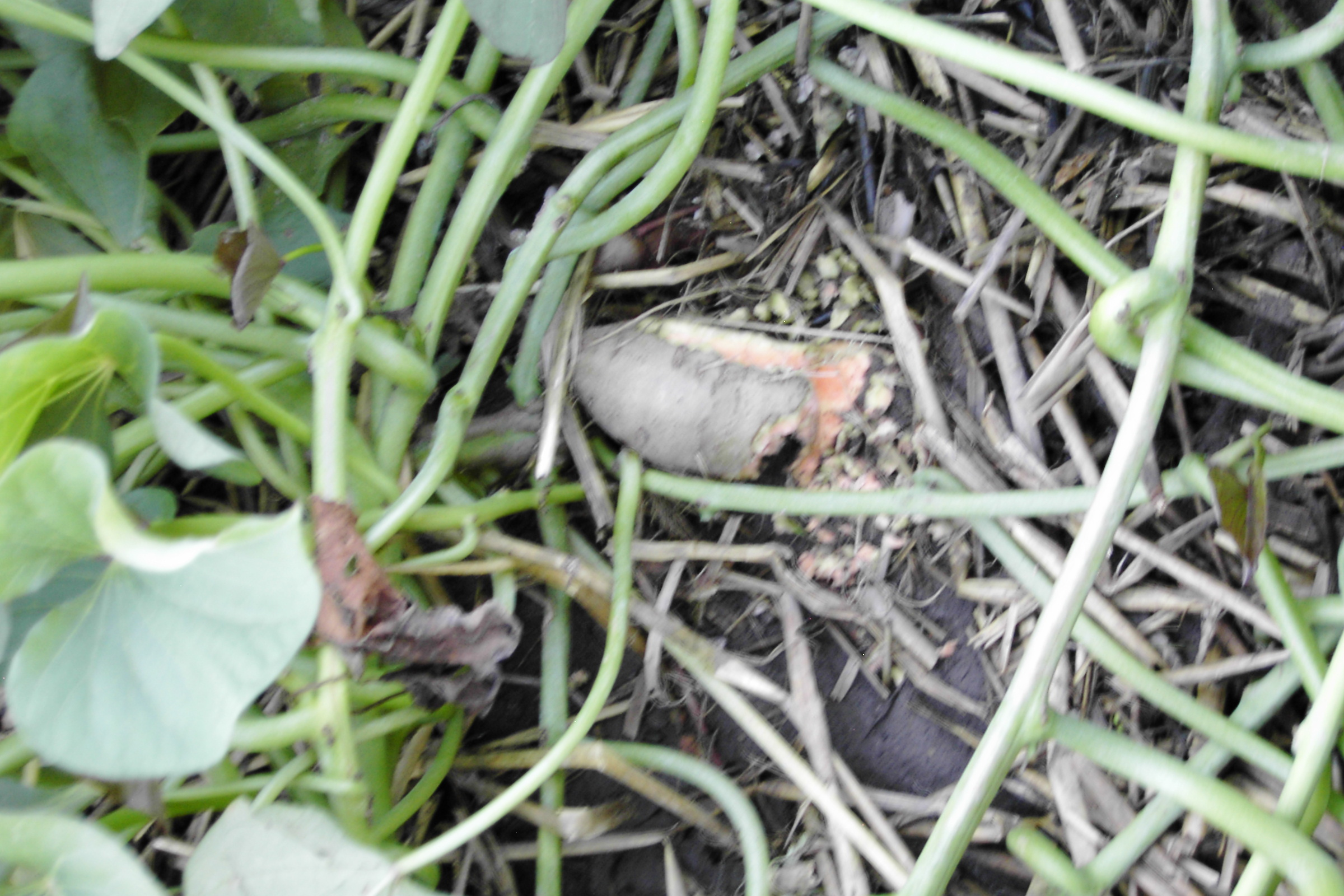 Mäuse schmecken die Süsskartoffel auch